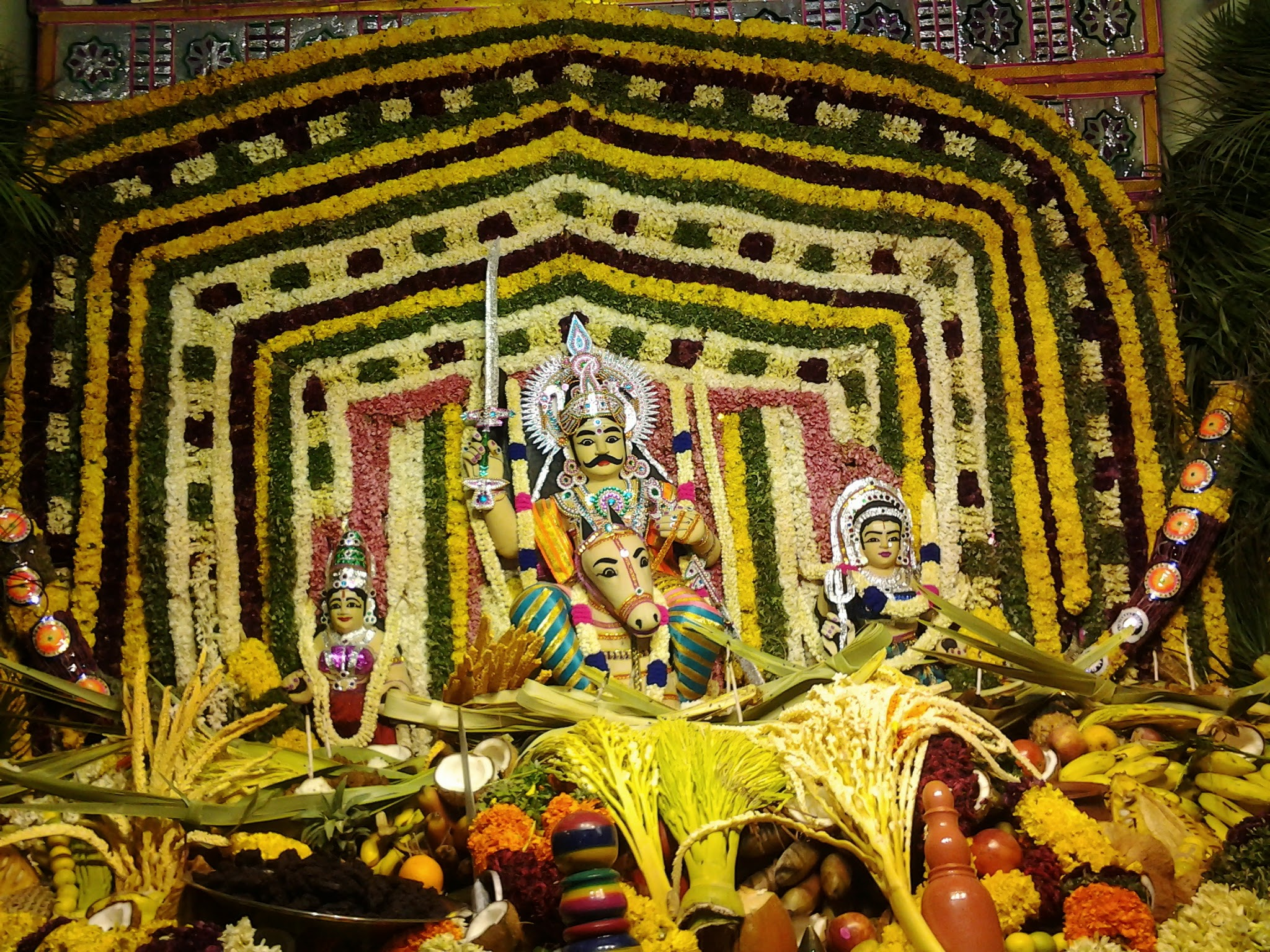 கலந்தப்பனை சுடலை ஆண்டவர்